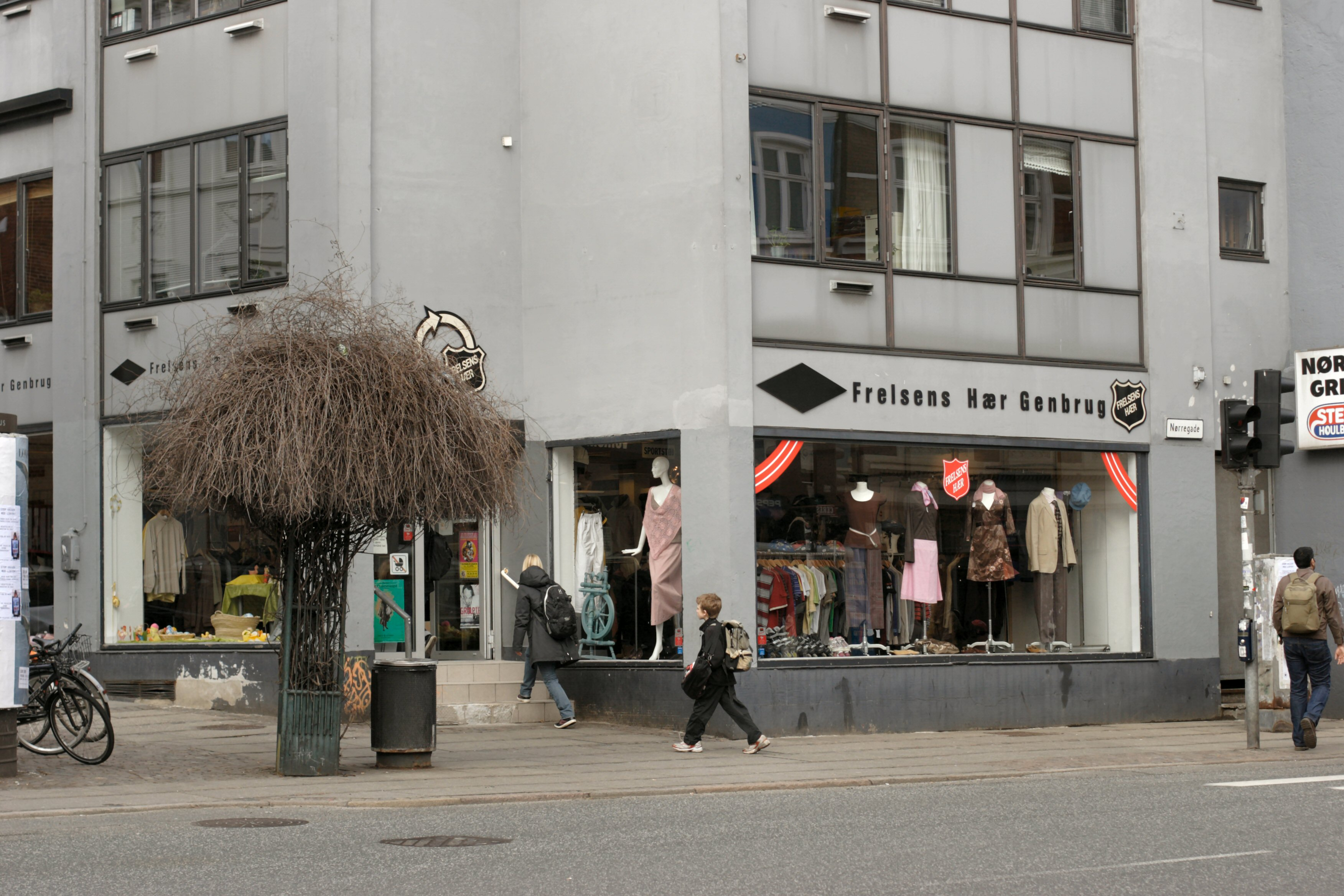 Genbrugsbutik på hjørnet af Nørregade og Norsgade i Aarhus, Danmark